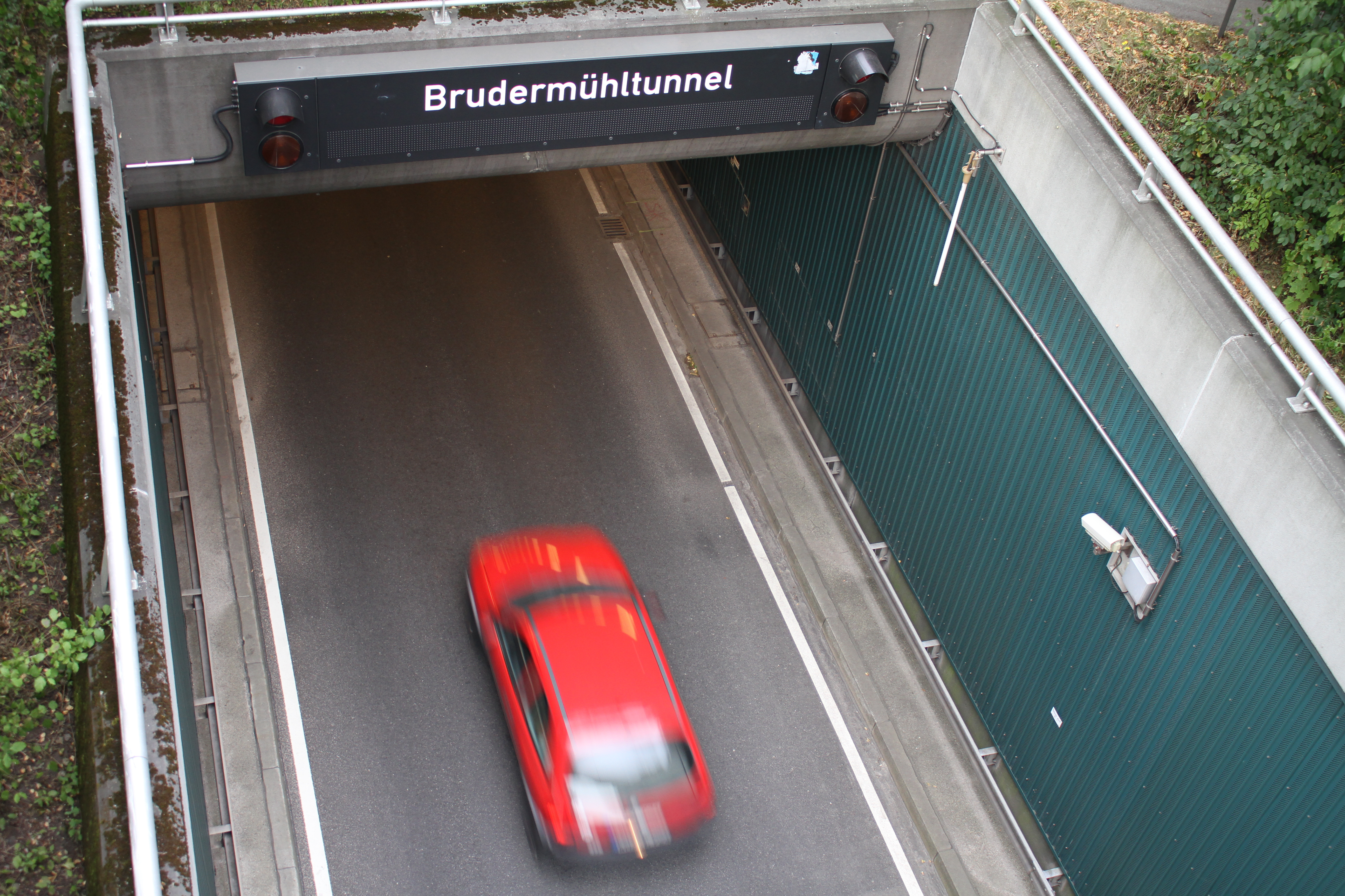 Brudermühltunnel, Zufahrt auf der Westseite